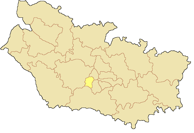 Canton d'Amiens-7 dans le département de la Somme